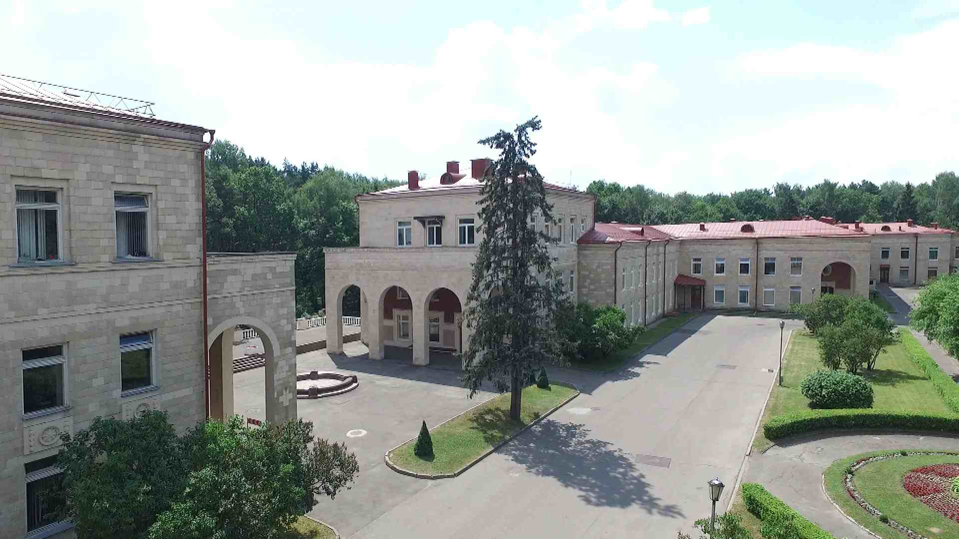 В этом корпусе в декабре 1957 года был принят первый пациент